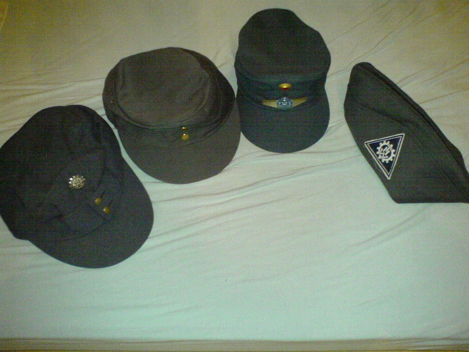 Bergmützen des THW. Von links nach rechts: Filzlaus, Einsatzanzug 80er Jahre, Dienstanzug 70er Jahre, Schiffchen ab 1968